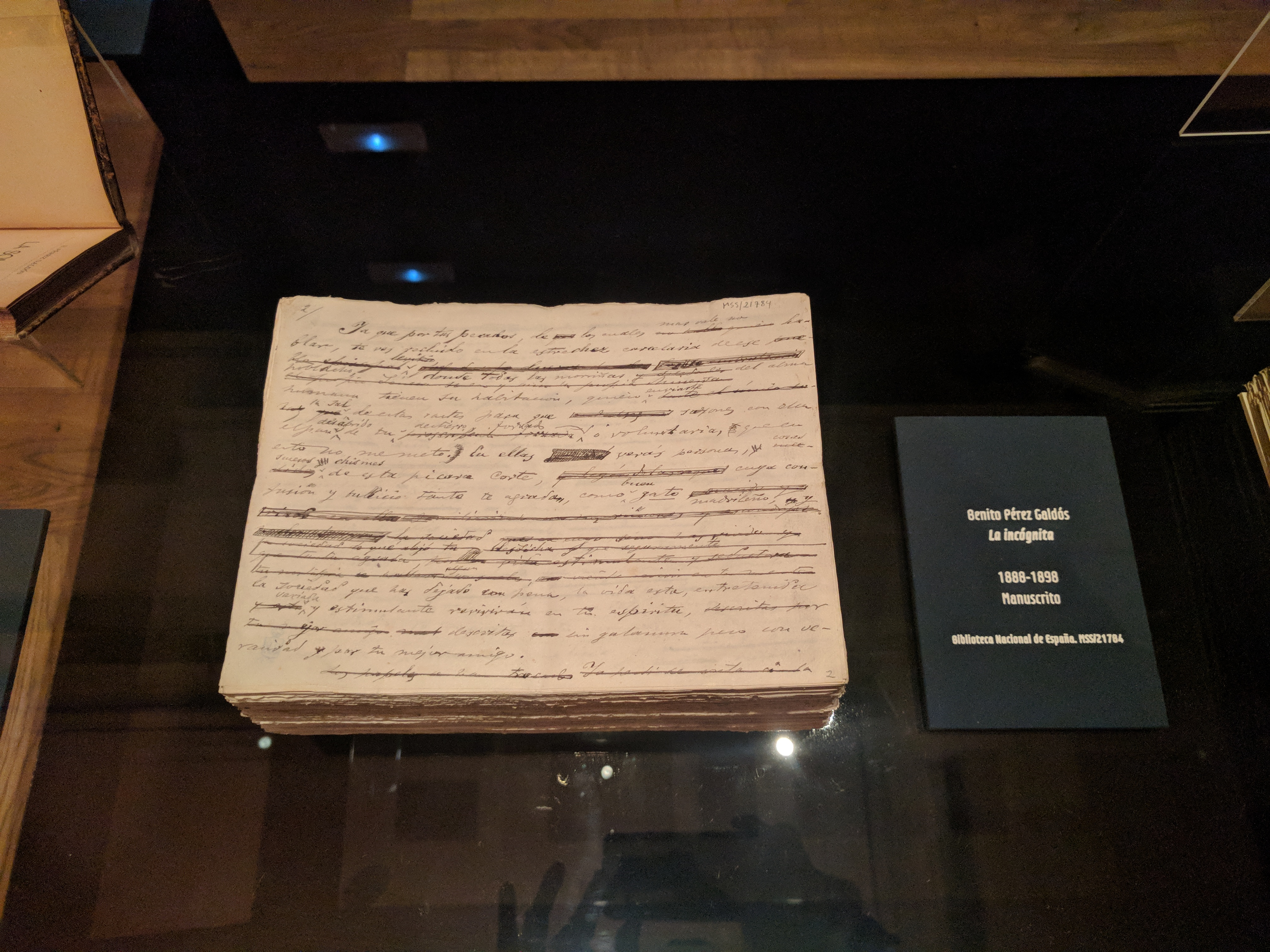 Manuscrito de La incógnita de Benito Pérez Galdós, 1888-1889. Biblioteca Nacional de España.